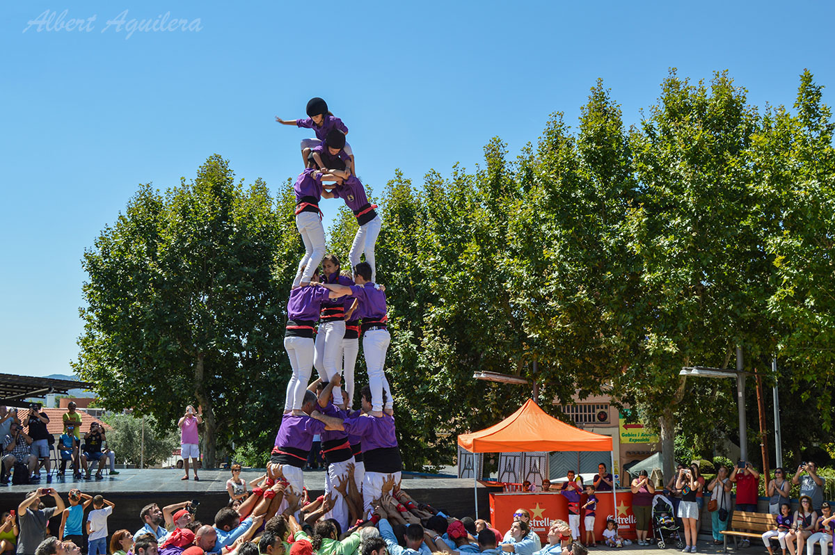 Castell 3de6 dels Manyacs de Parets